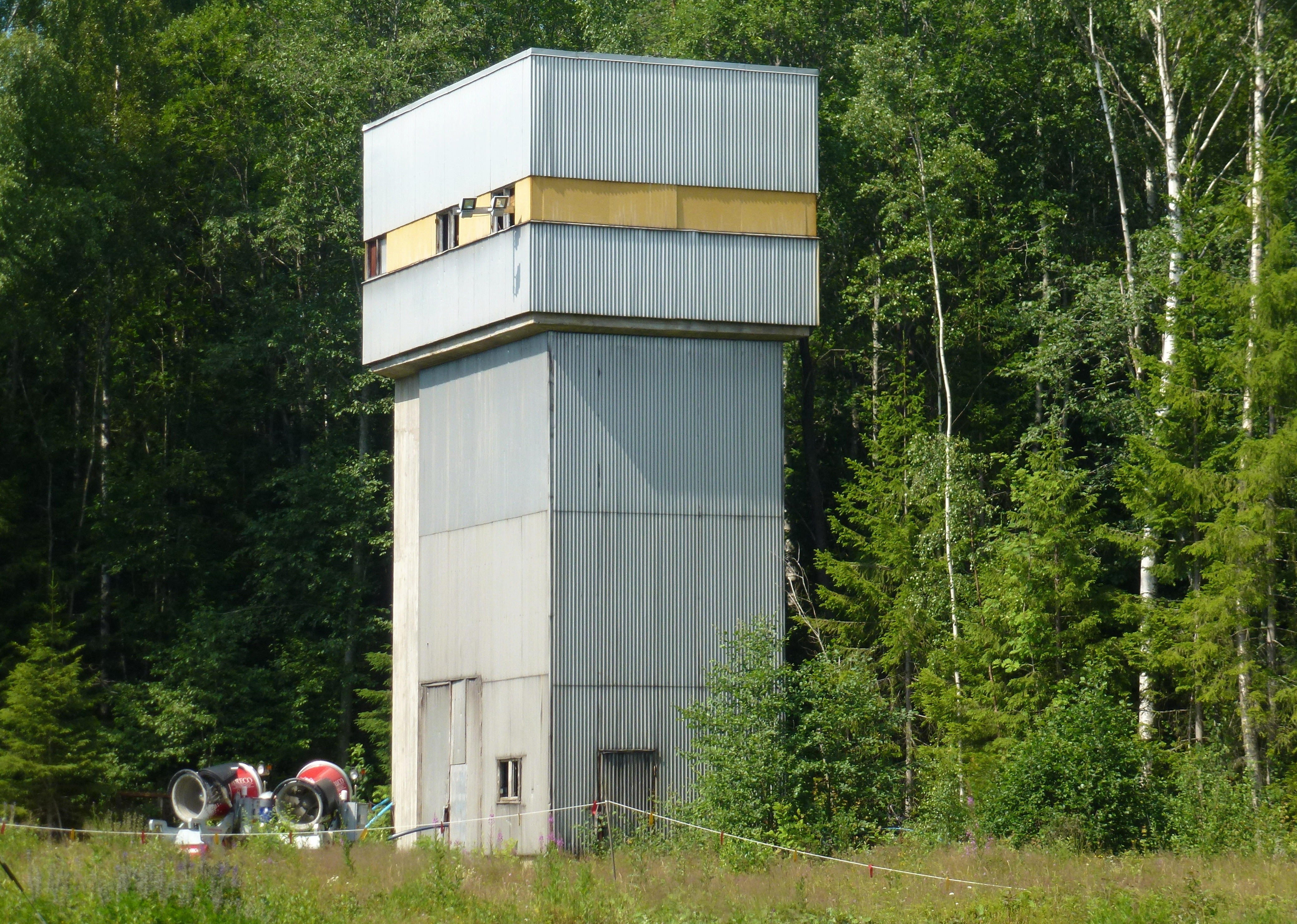 Källbottens gruva, laven